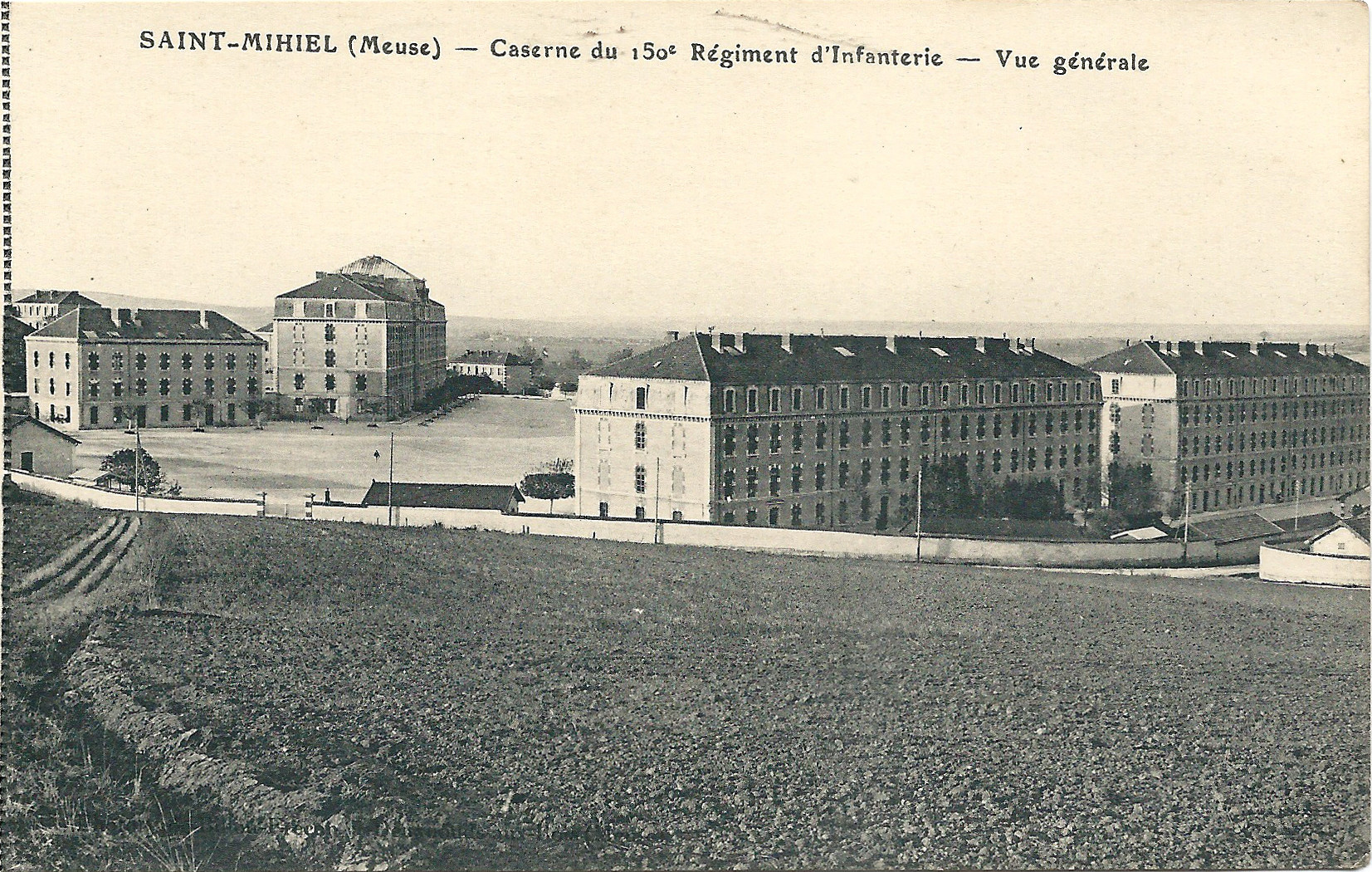 Saint-Mihiel (Meuse, France) , avant 1914.